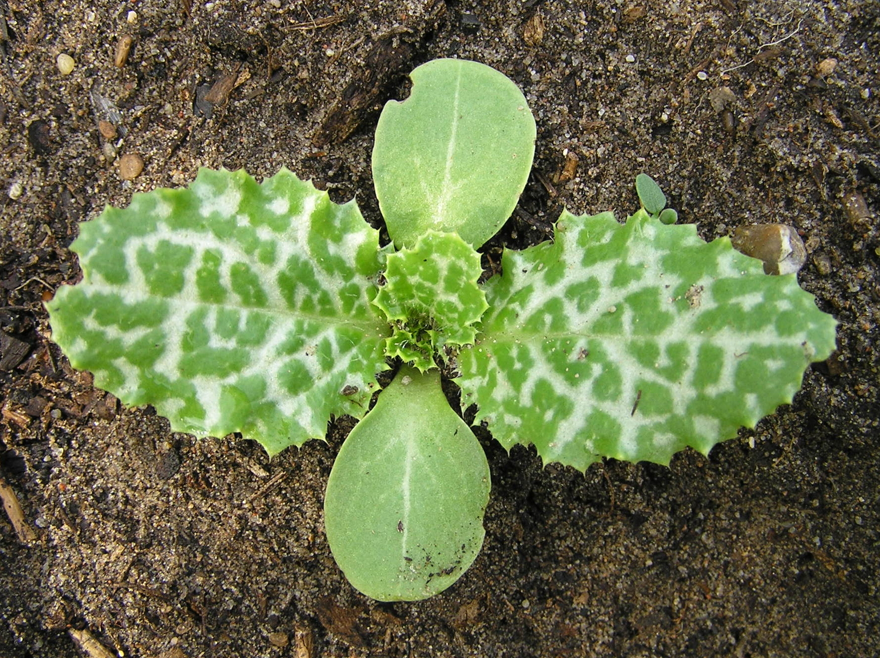 Silybum marianum, Ostropest plamisty, Białowieża, Polska